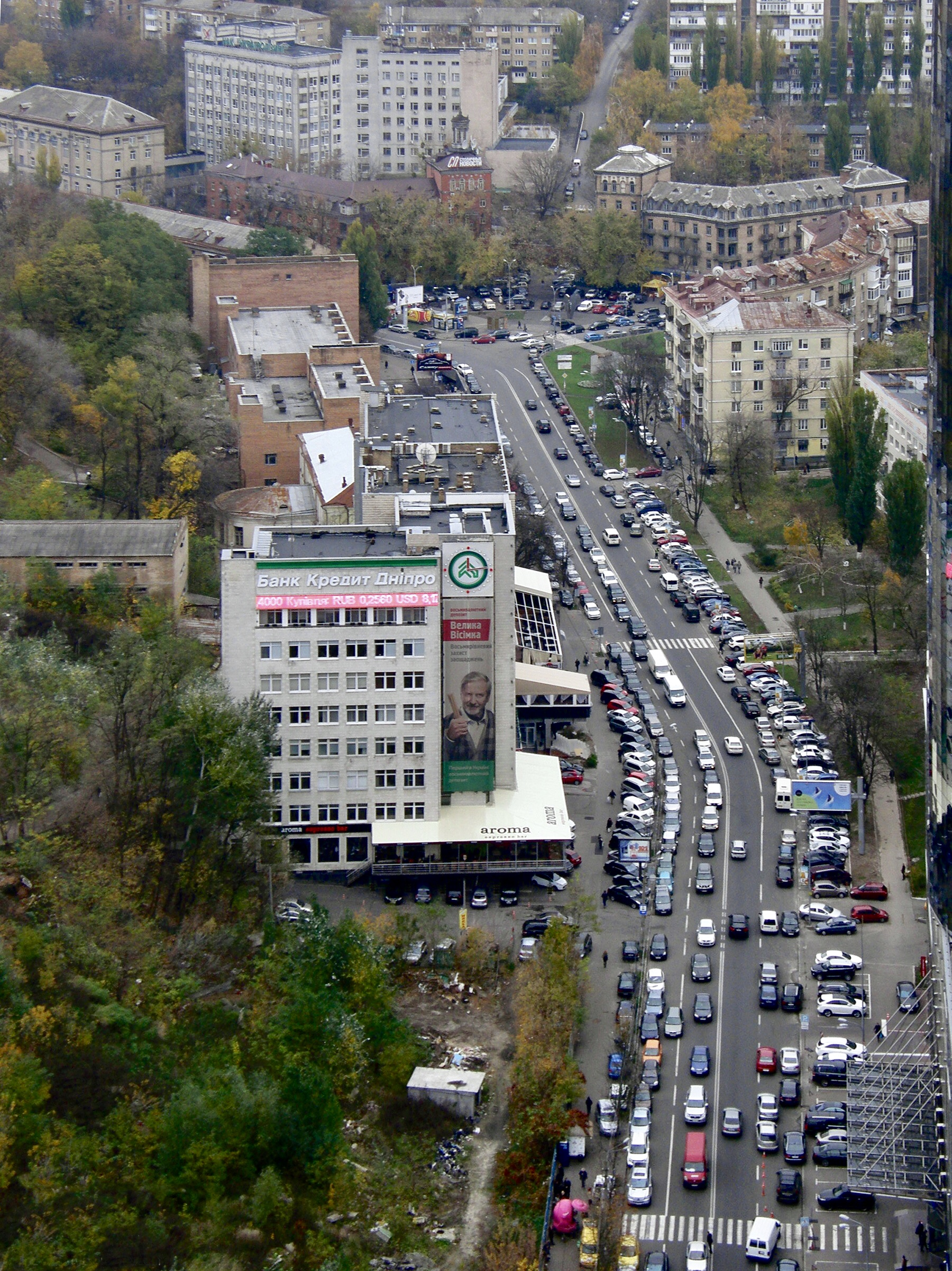 улица Мечникова